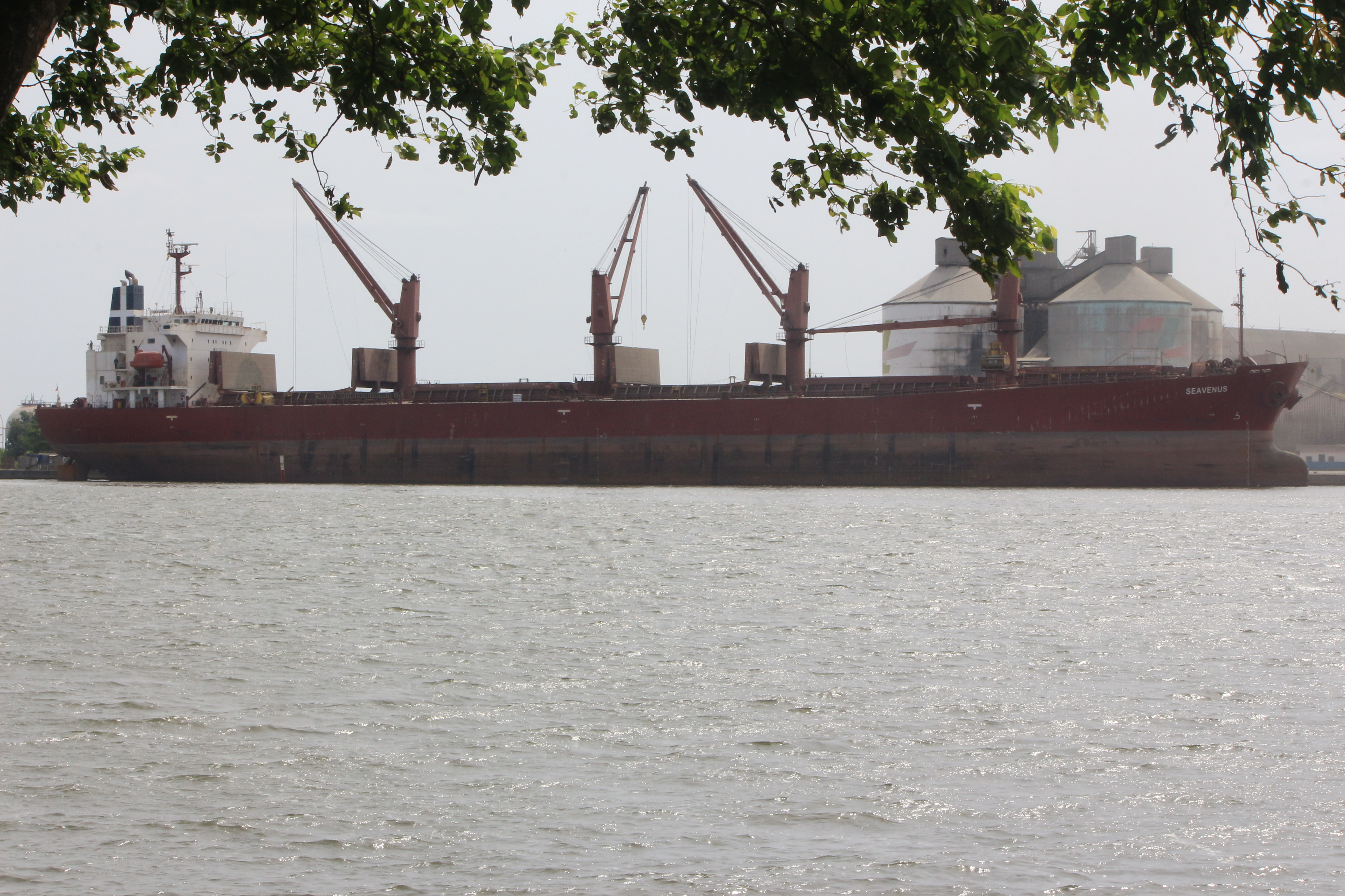 Bateau accosté au port de Douala This is an image with the theme "Africa on the Move or Transport" from: Cameroon